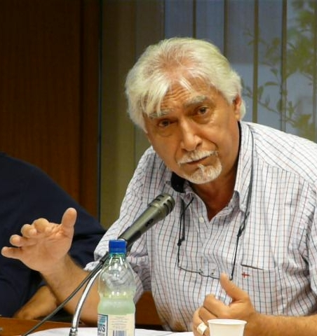 Diputado Oscar Groba